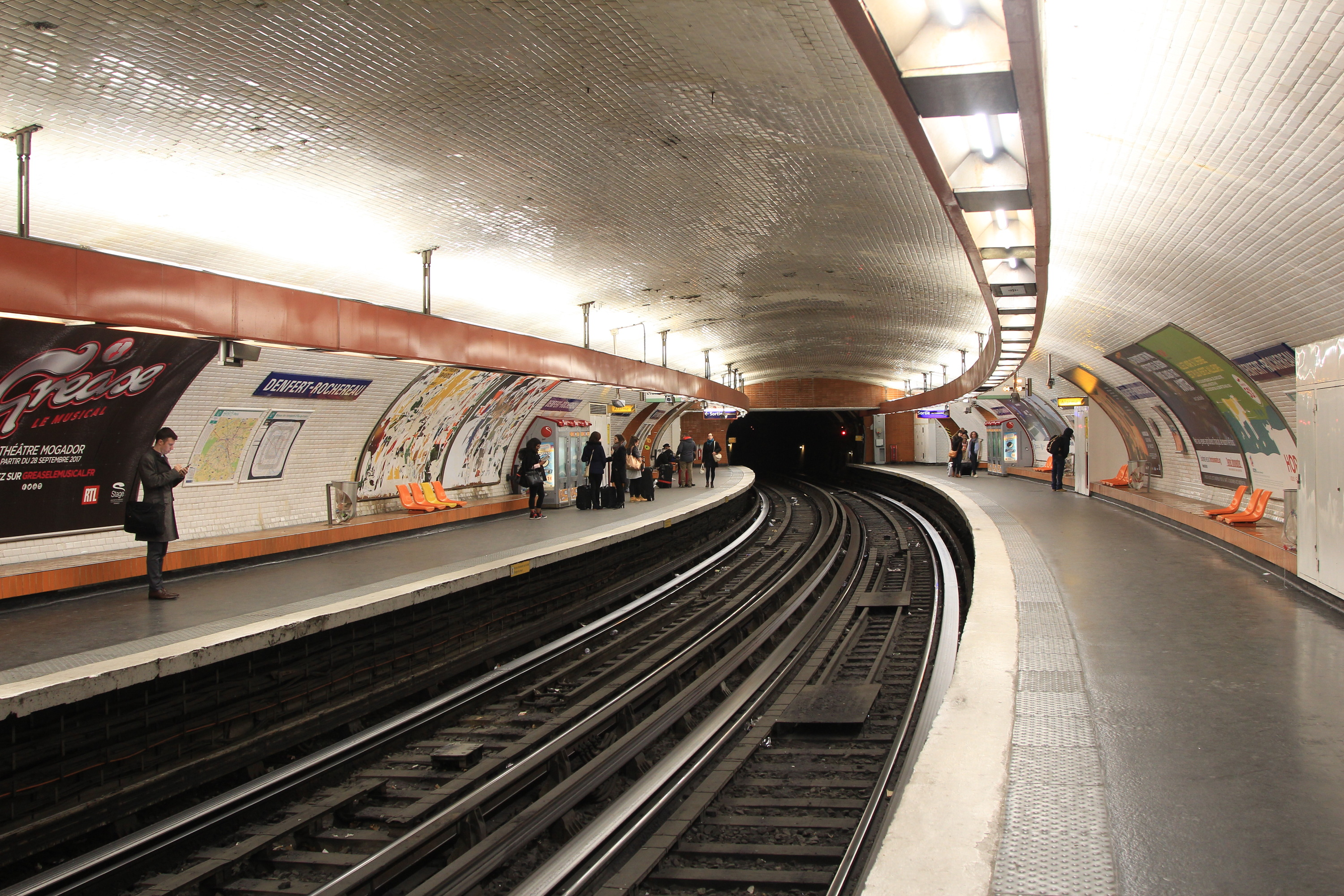 Vue des quais de la station Denfert-Rochereau de la ligne 6 du métro de Paris, en direction de Nation.